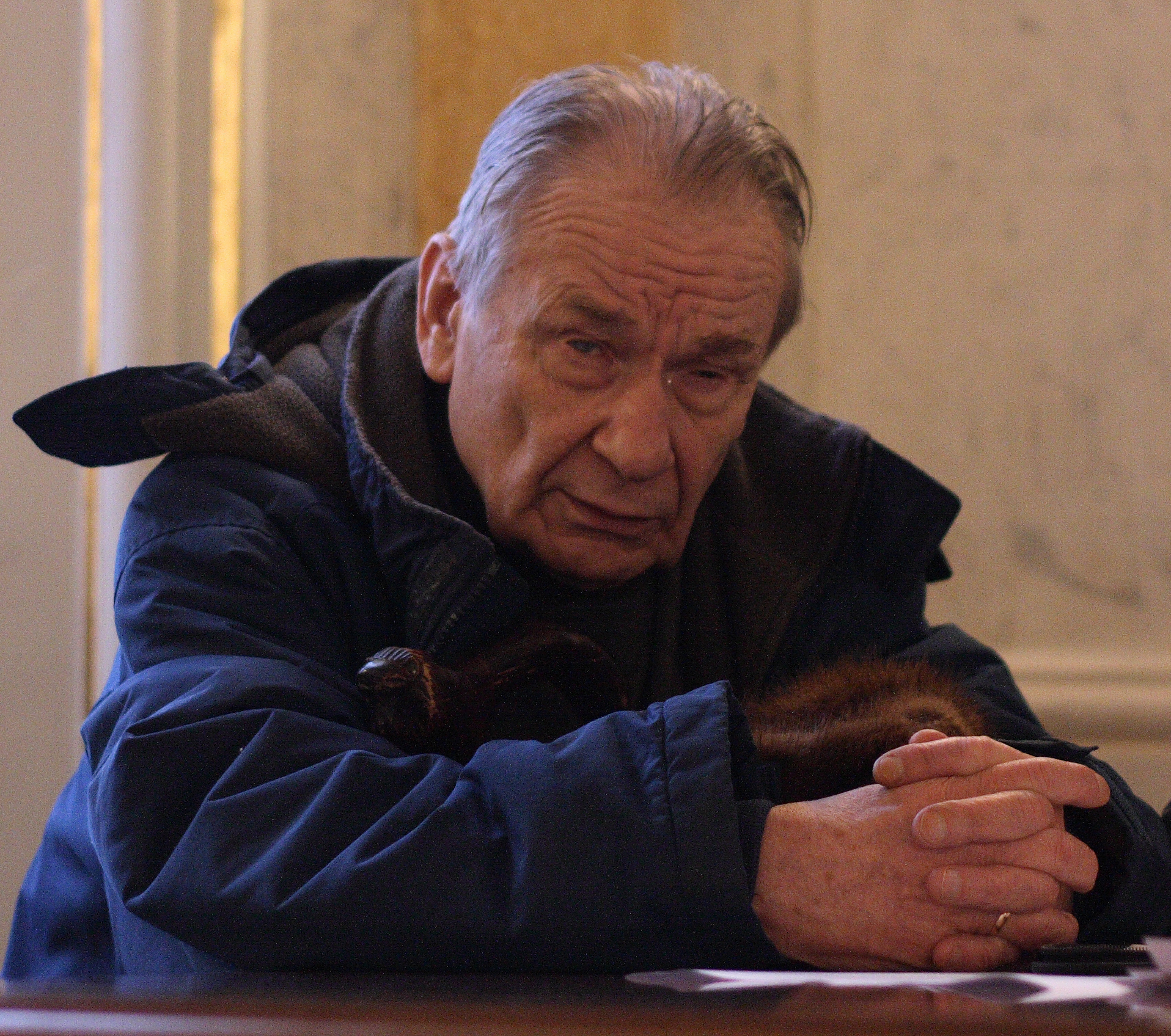 Шухевич Юрий Романович, украинский политический и общественный деятель националистической направленности